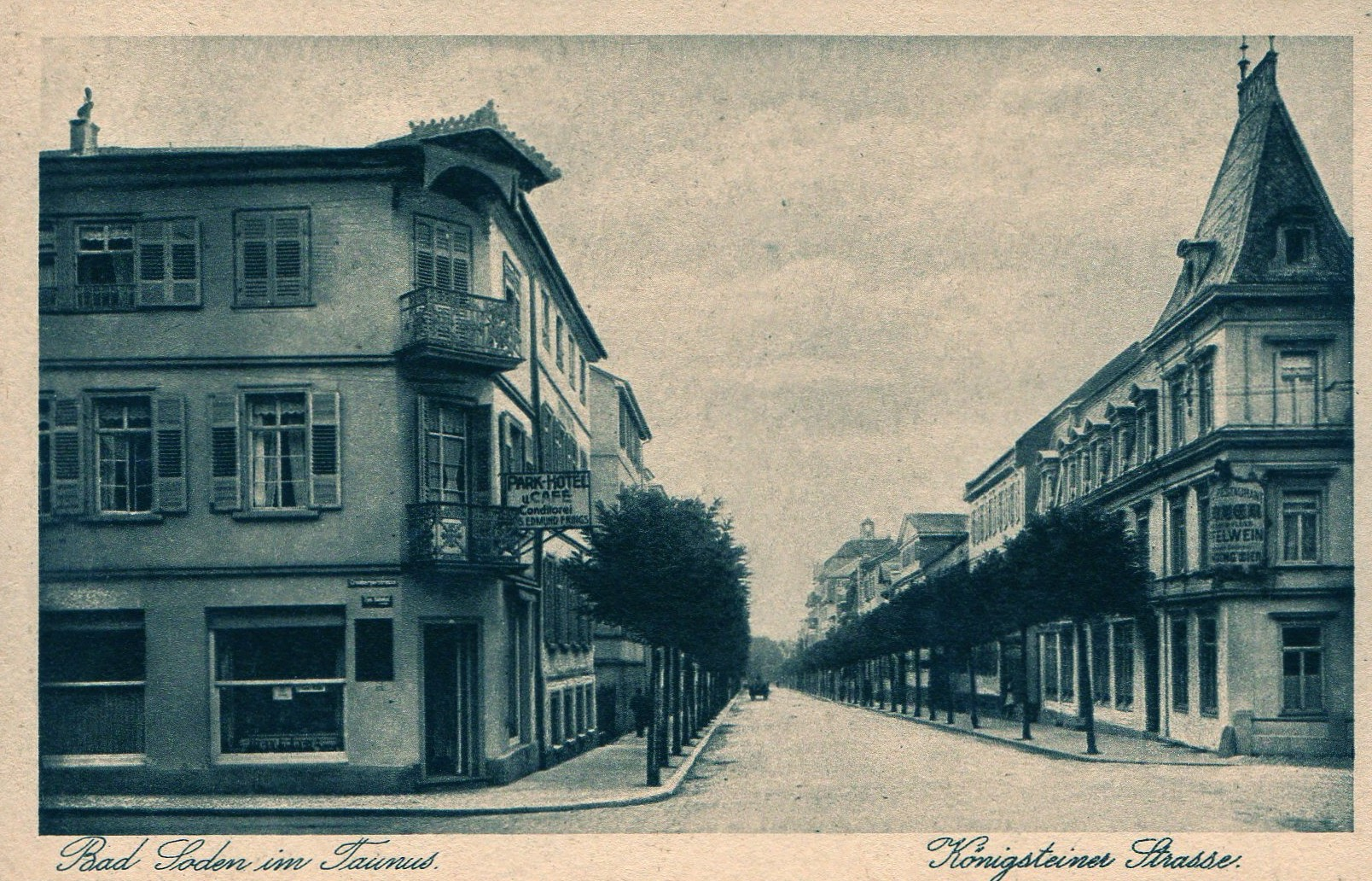 königsteiner Straße in Bad Soden am Taunus 1930, Parkhotel und Hotel Adler